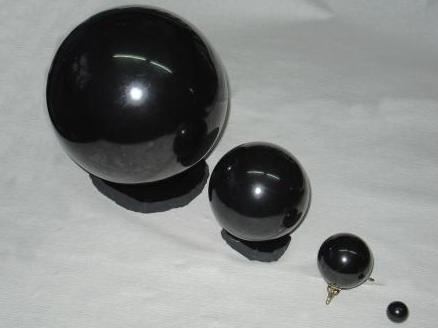 Souvenir balls from shungite produced in Zazhoginsky field. Made by the company "Karelian horizon"